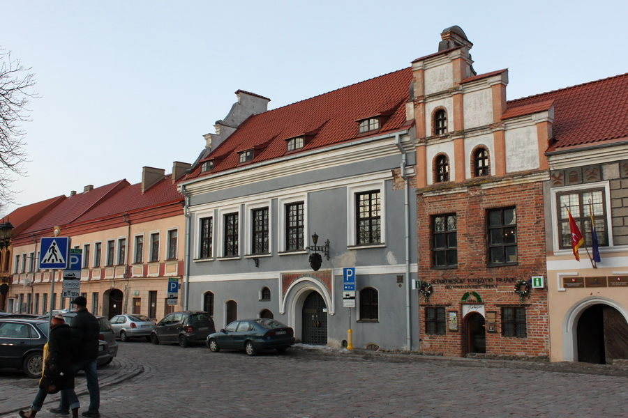 Lietuvos medicinos ir farmacijos istorijos muziejus Kaune.